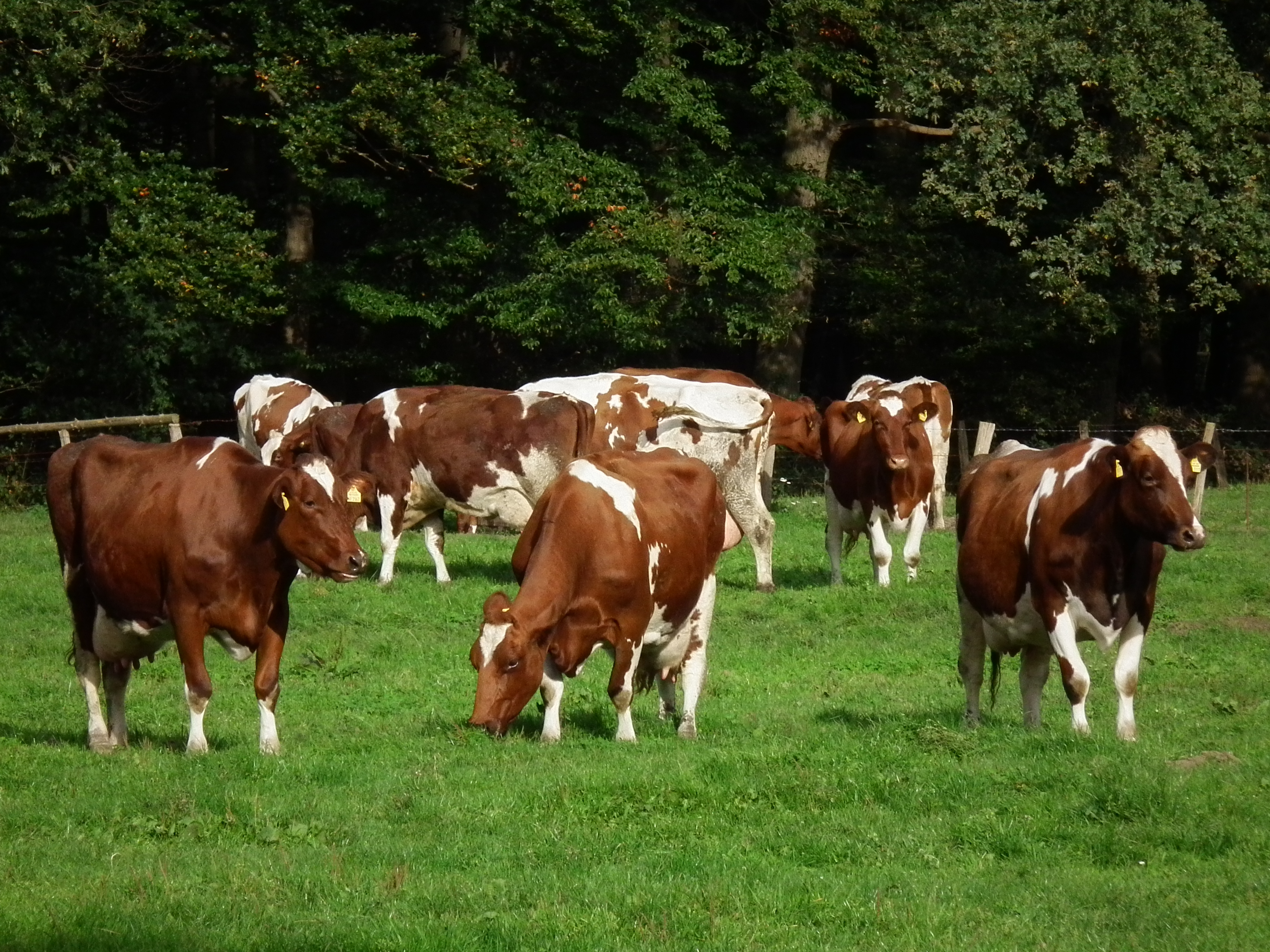 Rot-weiße Milchkühe auf einer Weide in Gescher (Nordrhein-Westfalen, Deutschland)